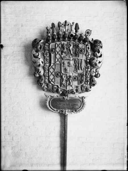 Huvudbanér för Karl Mauritz Lewenhaupt, död 1666. Kategori: (09) Vapen Huvudbanér för Karl Mauritz Lewenhaupt, död 1666.